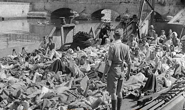 Soldati inglesi feriti giungono in nave al porto di Siracusa